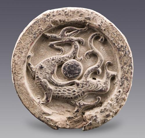 一個青龍圖案的瓦當。